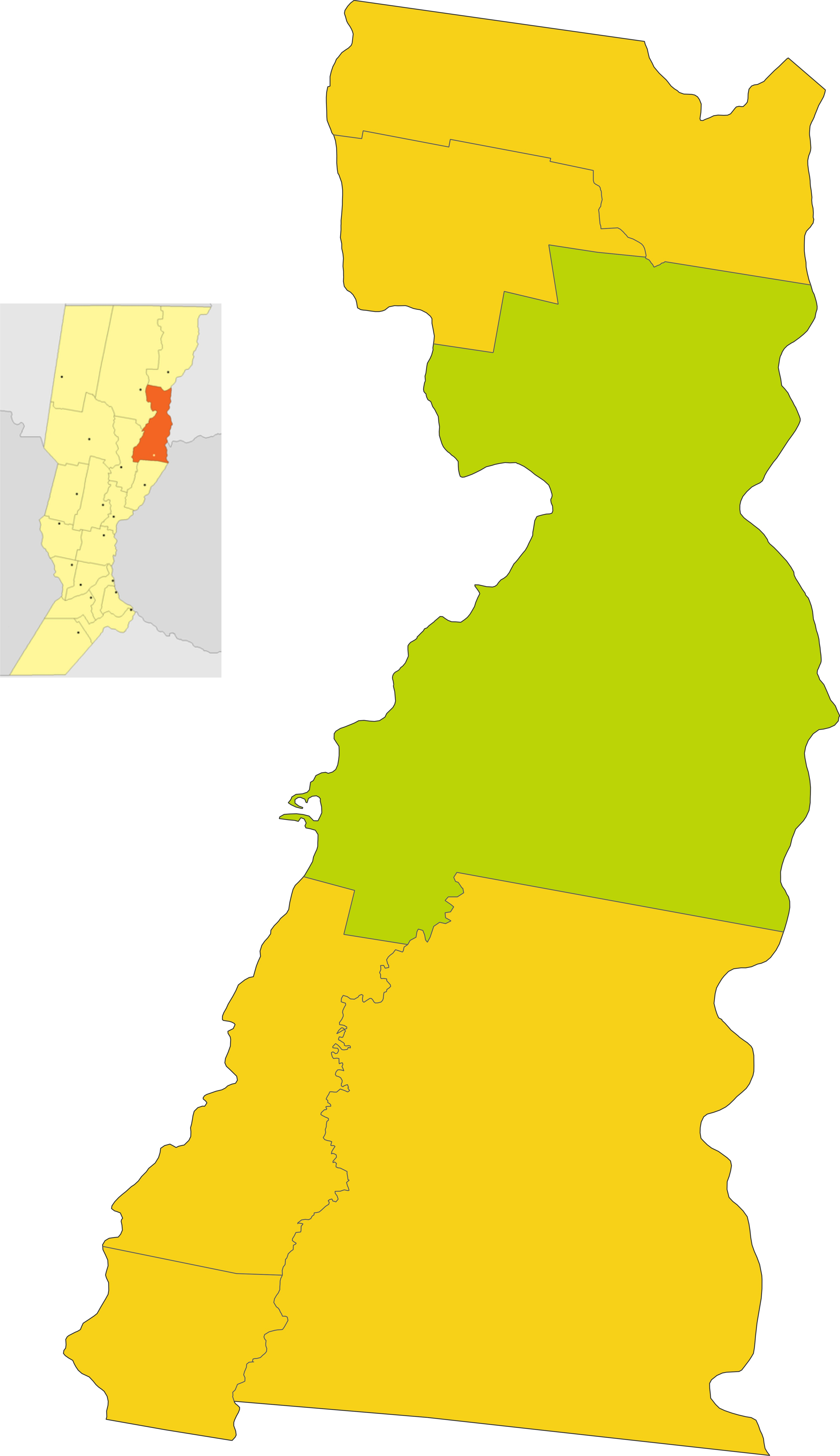 Map of the comuna de Alejandra in San Javier department, Santa Fe province, Argentina